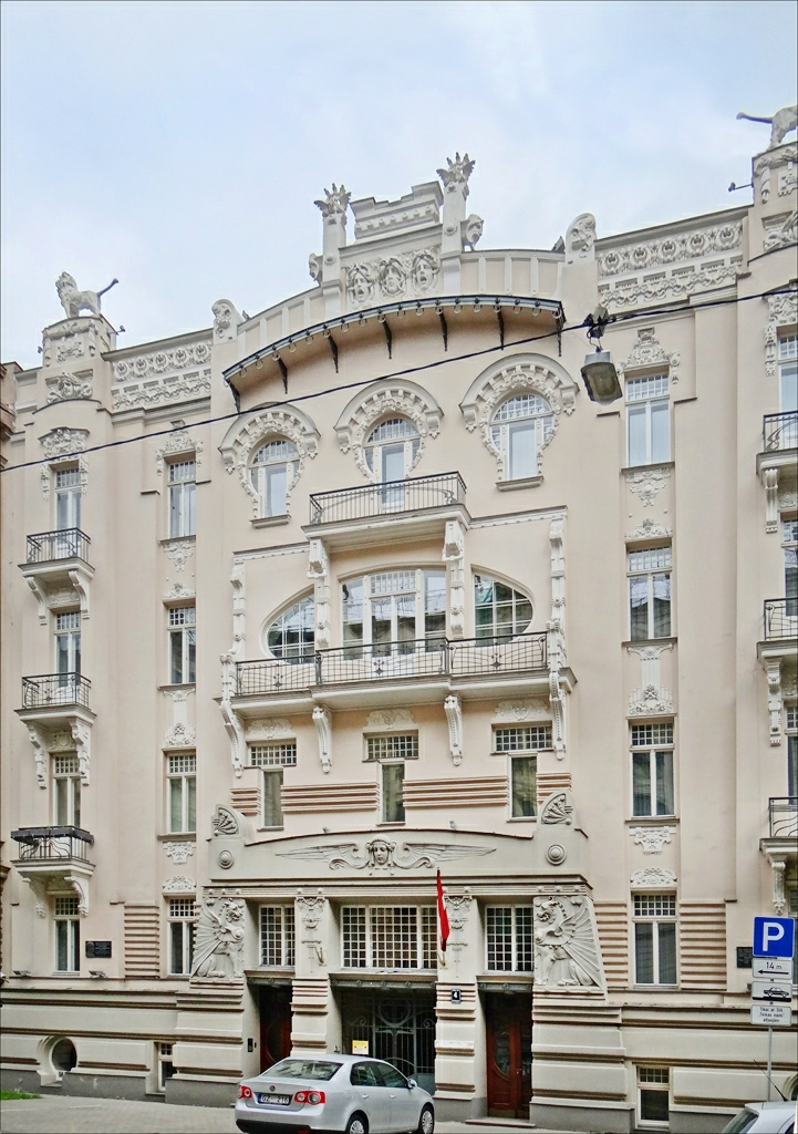 Vue d'ensemble de l'immeuble art nouveau au n°4 rue Alberta à Riga Cet immeuble de style art nouveau (jugendstil) a été conçu par l'architecte Mikhail Eisenstein (1867-1921) au tout début du 20ème siècle. Il est situé au n°4 de la rue Alberta (Alberta Iela) Ce bâtiment est considéré comme le chef d’œuvre de l'architecte. Il est en effet plus équilibré et épuré que la plupart de ses réalisations dont les décors sont souvent surchargés. Les balcons en fer forgé sont remarquables, ils se rapprochent en effet du style Sécession viennois et leur transparence allège la façade dont les décors les plus sophistiqués sont dans les parties hautes ou basses. NDLR : le ministère de la culture letton devrait se préoccuper de faire enterrer les fils électriques qui dans la rue Alberta, comme partout dans Riga, dénaturent le patrimoine architectural art nouveau. Sur cette photographie, j'ai supprimé un grand nombre de fils avec Photoshop (au moins 1/4h de travail), j'en ai laissé un seul qui demande trop de travail pour le supprimer. _________ Riga, capitale de la Lettonie, est un parfait exemple de ville Art Nouveau. Son centre abrite la plus belle concentration de bâtiments Art nouveau au monde: plus d'un tiers d'entre eux appartiennent en effet à ce style. Cet ensemble architectural est inscrit sur la liste du Patrimoine mondial.... Extrait du site du réseau des villes art nouveau